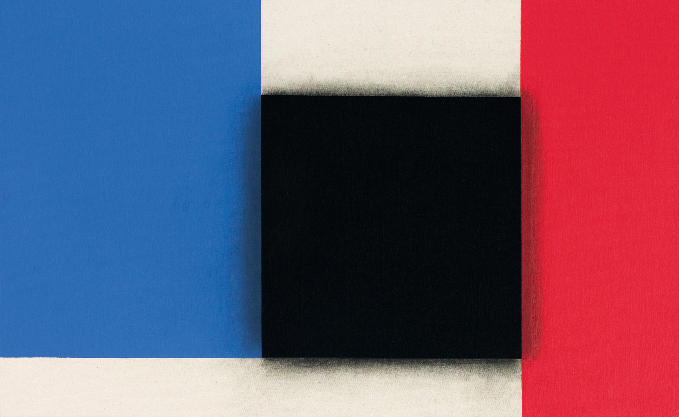 Lienhard von Monkiewitsch Öl/Acryl auf Leinwand 1994 Komposition mit den aufeinander folgenden Fibonaccizahlen 8,13,21,34,55,89